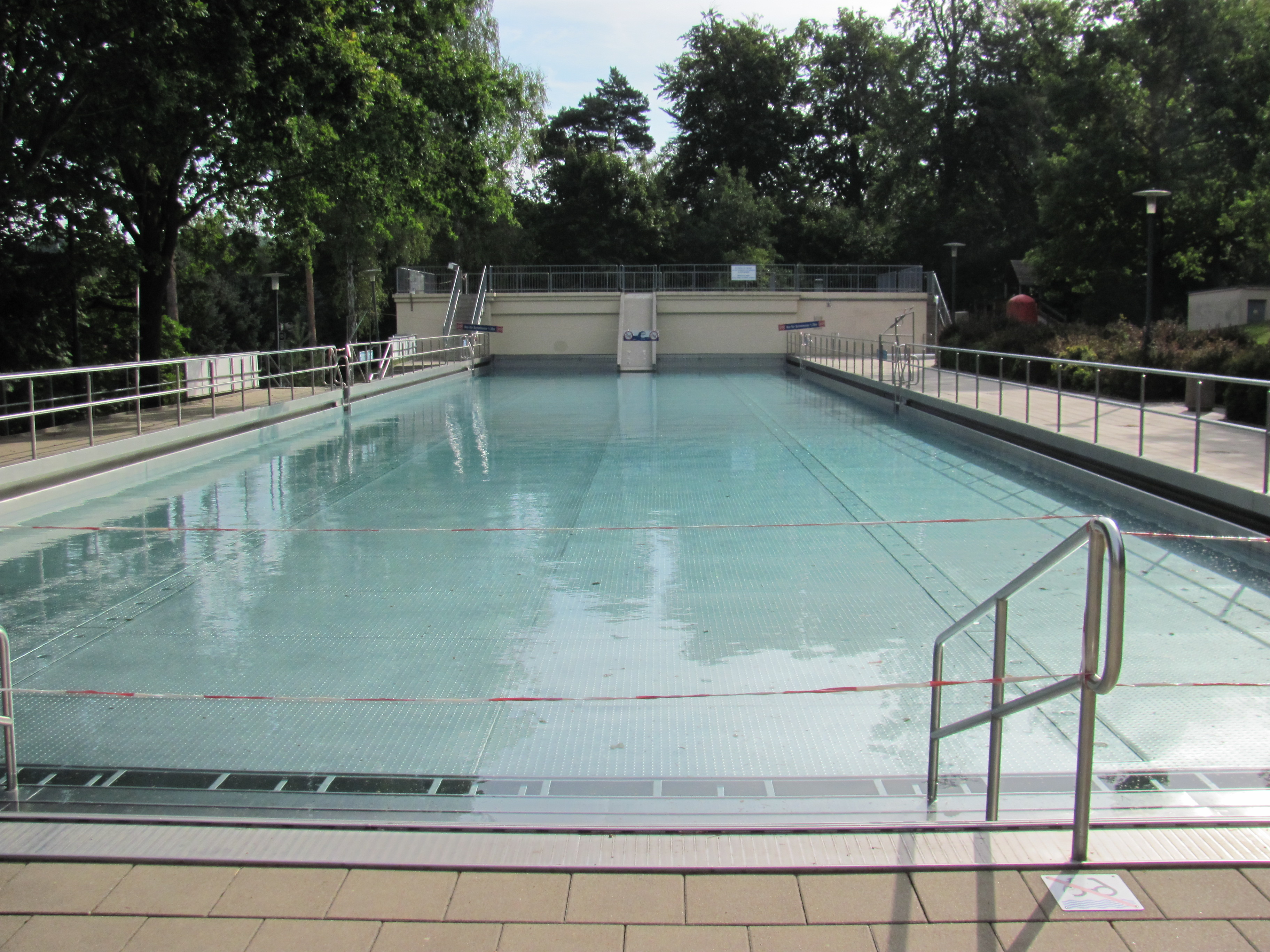 Bilzbad, Tag des offenen Denkmals 2015